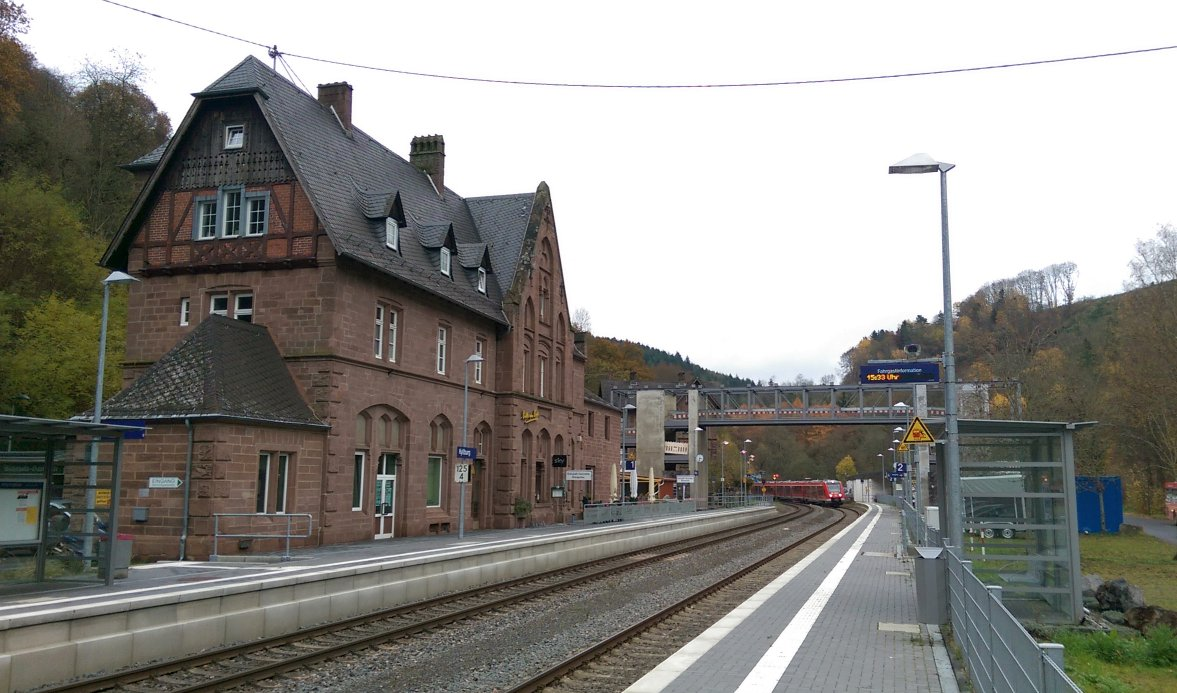 Bahnhof Kyllburg an der Eifelstrecke. Im Hintergrund die 2015 errichtete (zum Aufnahmezeitpunkt noch nicht zur Benutzung freigegebene) Fußgänger-Überführung. Ein LINT 81 fährt gerade als Regionalbahn von Köln nach Trier ein.